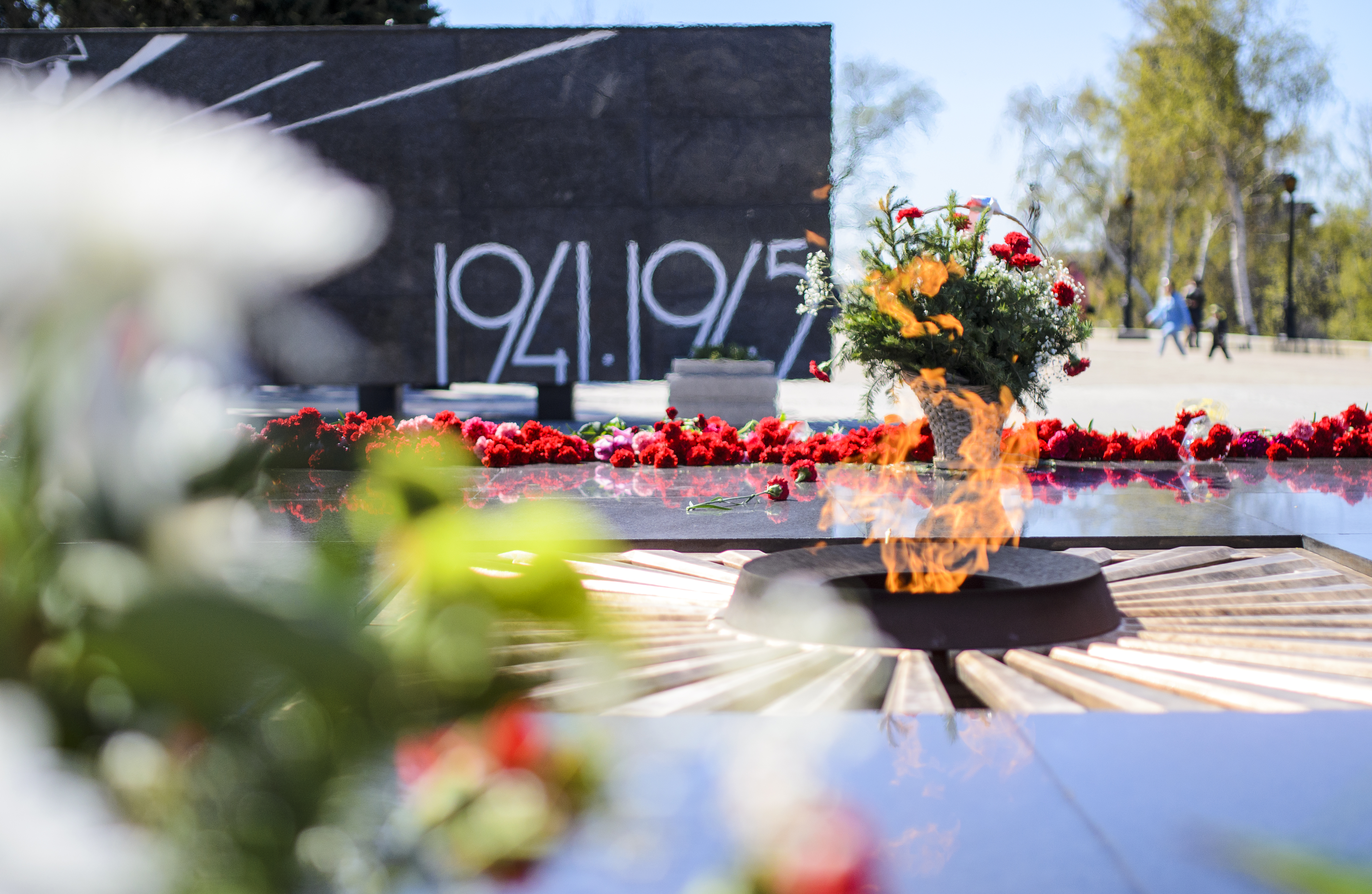 Мемориальный комплекс, посвященный воинам-землякам, погибшим в годы Великой Отечественной войны 1941-1945 г: Кремль, Нижний Новгород, Нижегородская область